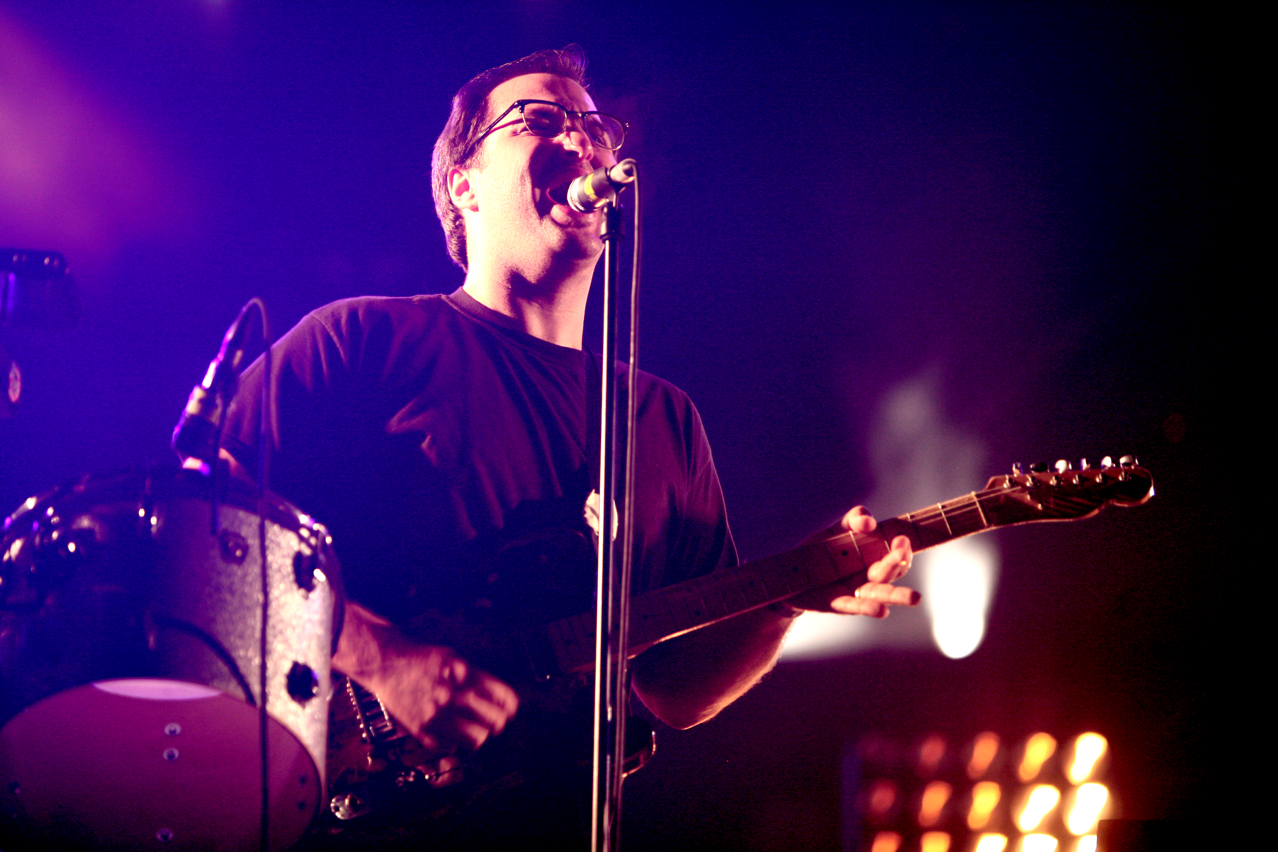 LCD Soundsystem at Rock en Seine Route du Rock, August 2007